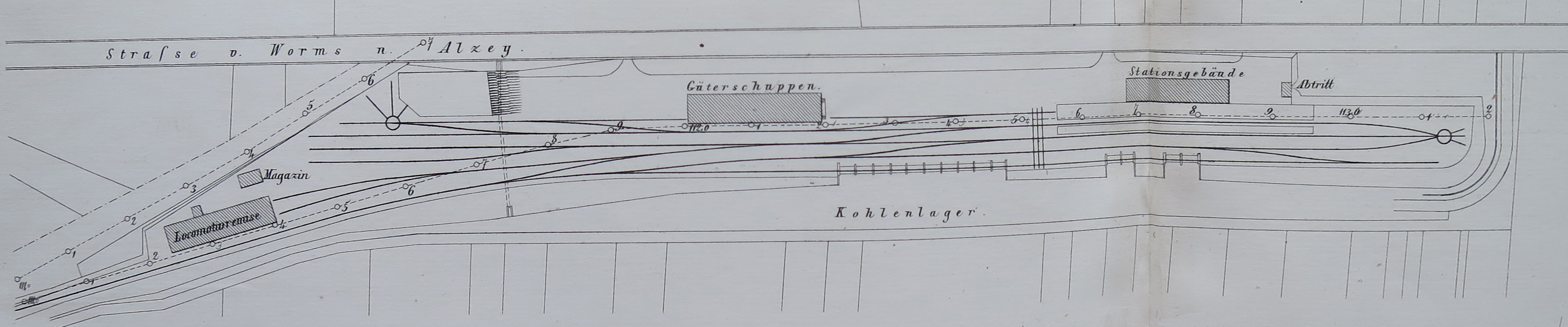 Gleisplan des Bahnhofs Alzey (Planung) zur Eröffnung 1871